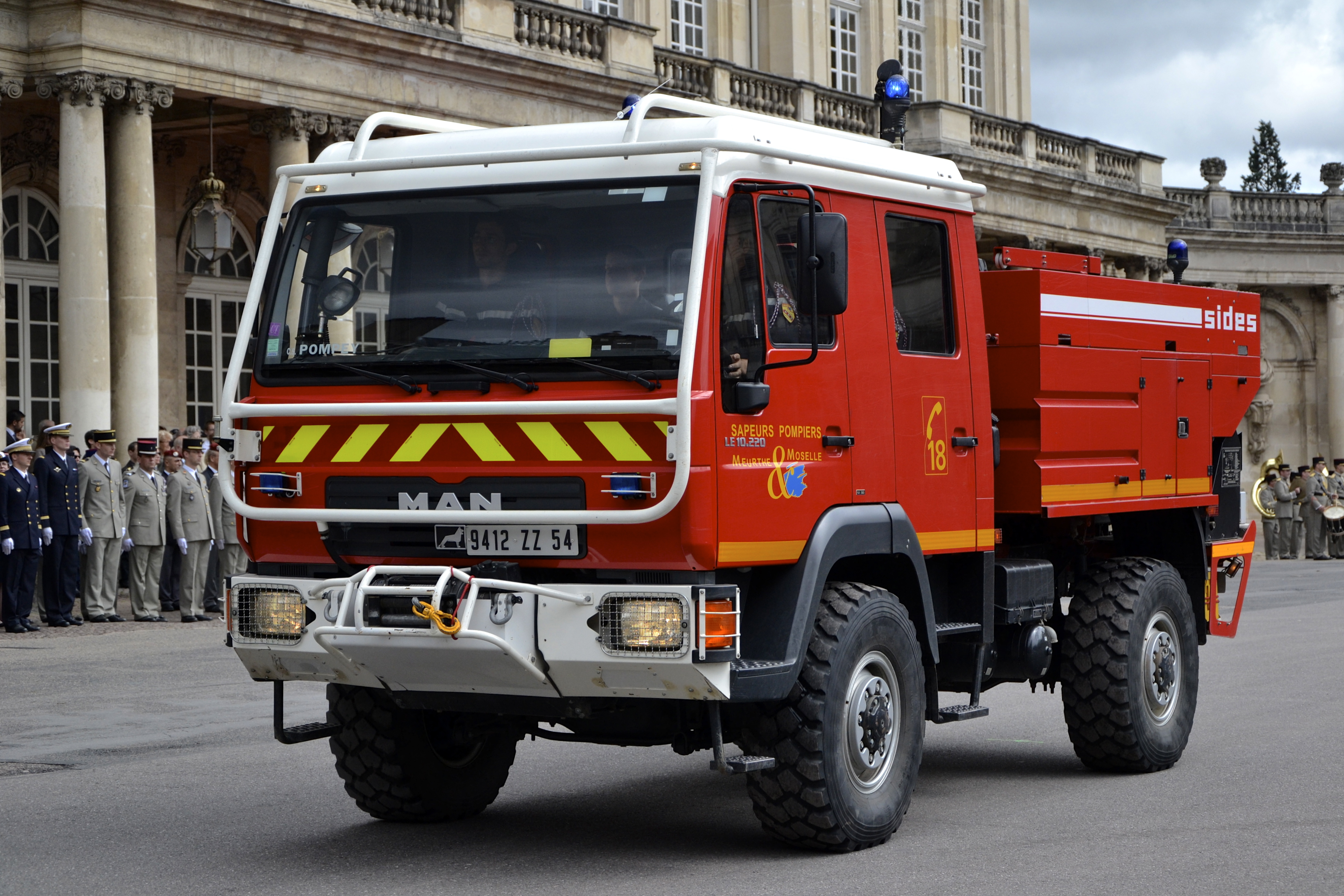 Camion Citerne Feux Forêts 2000.